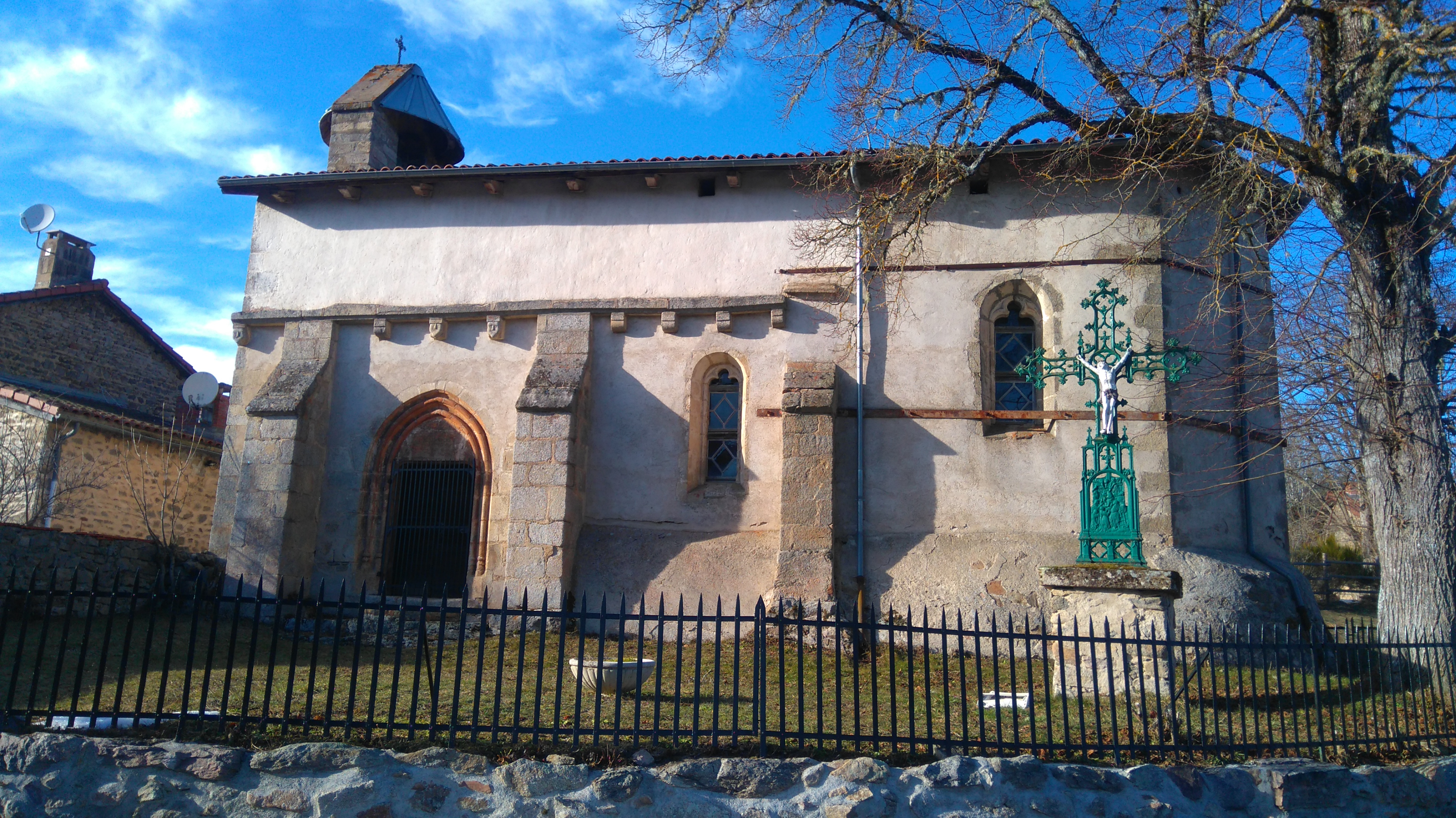 église, vue de l'extérieur